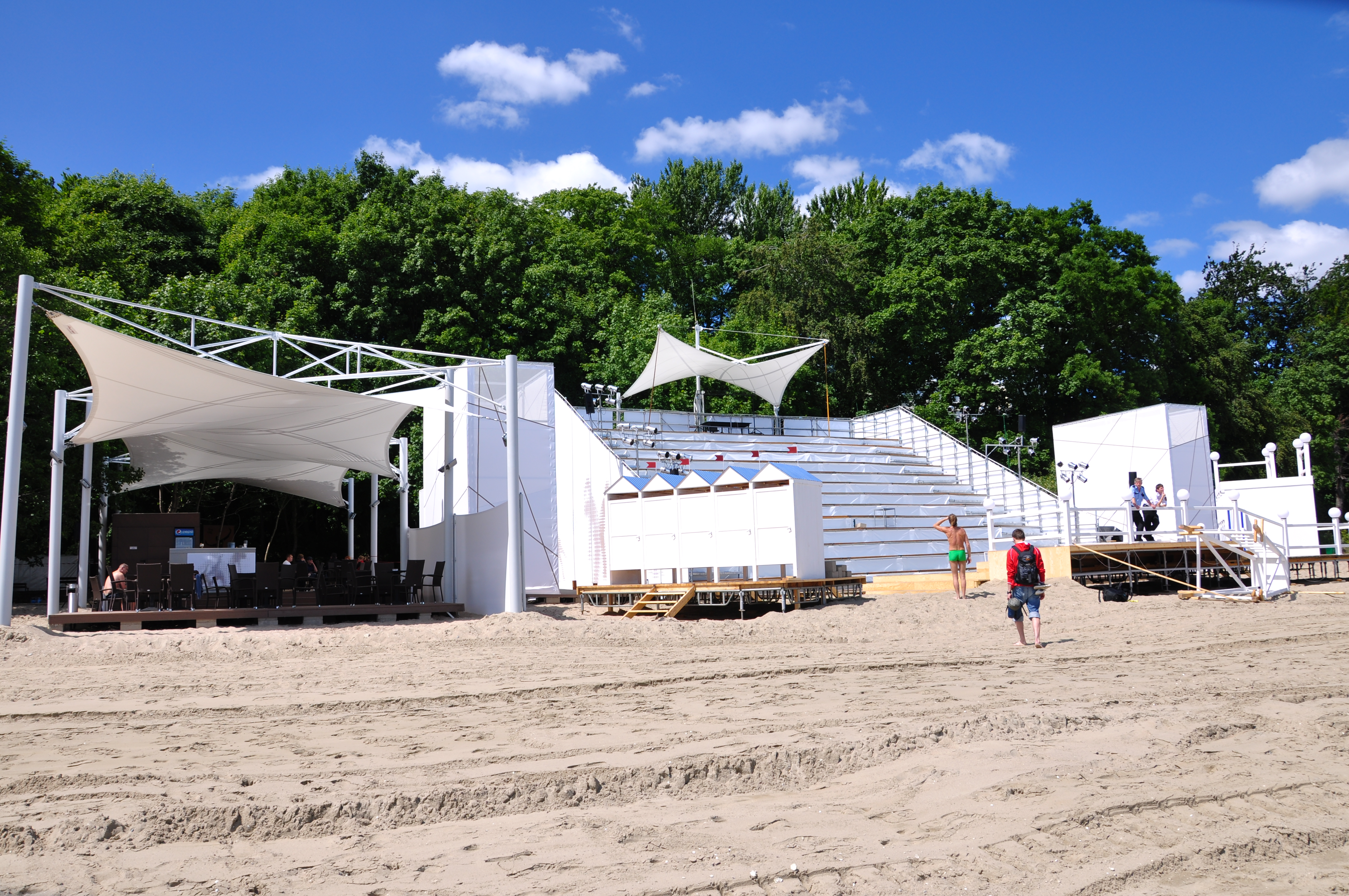 Scena Letnia Teatru Miejskiego im. Witolda Gombrowicza w Gdyni Orłowie została w 2010 roku przeniesiona z plaży koło molo w Orłowie po jesiennych sztormach, które uszkodziły łazienki